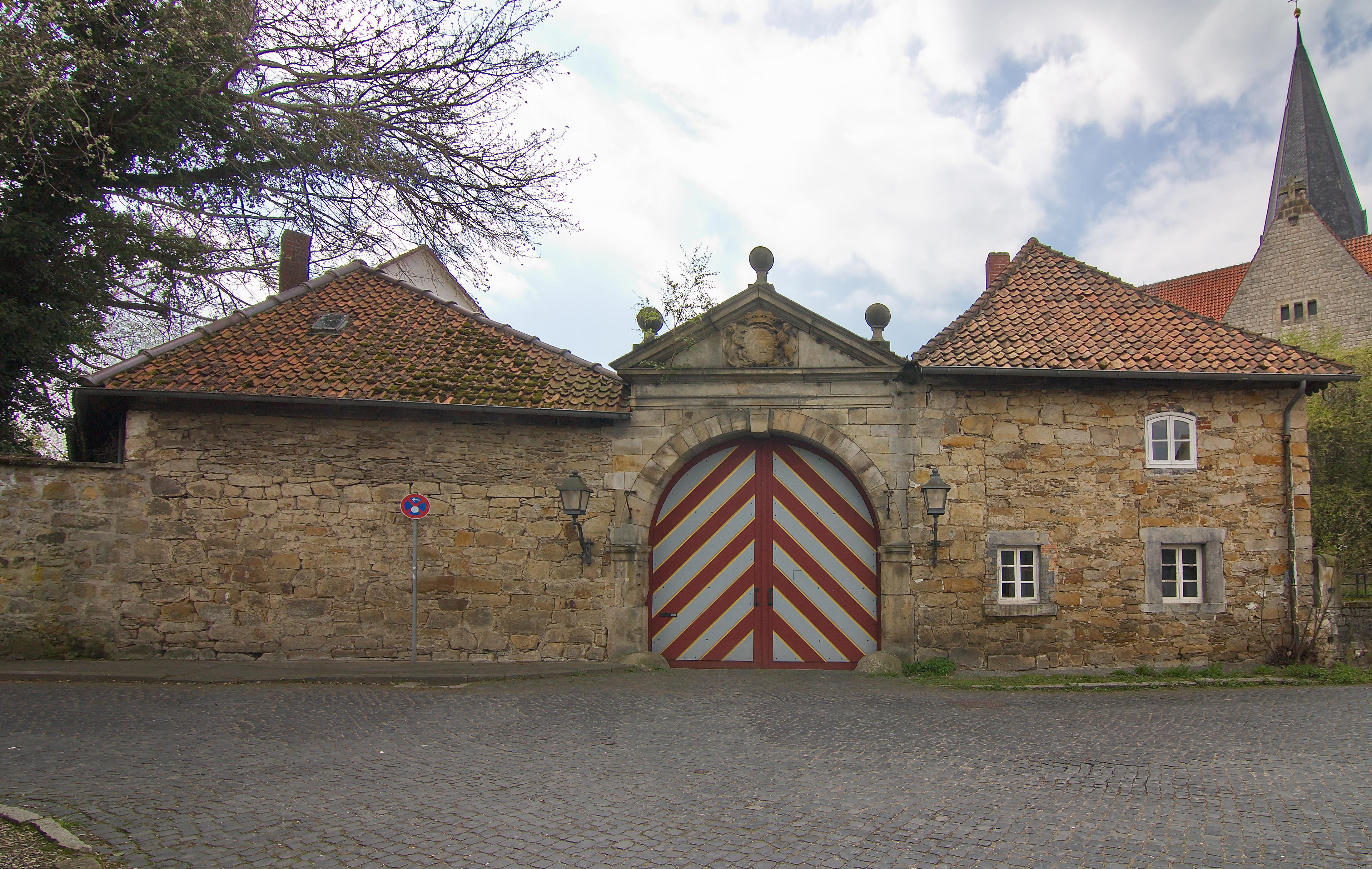 Rittergut Bennigsen in Bennigsen (Springe), Niedersachsen, Deutschland